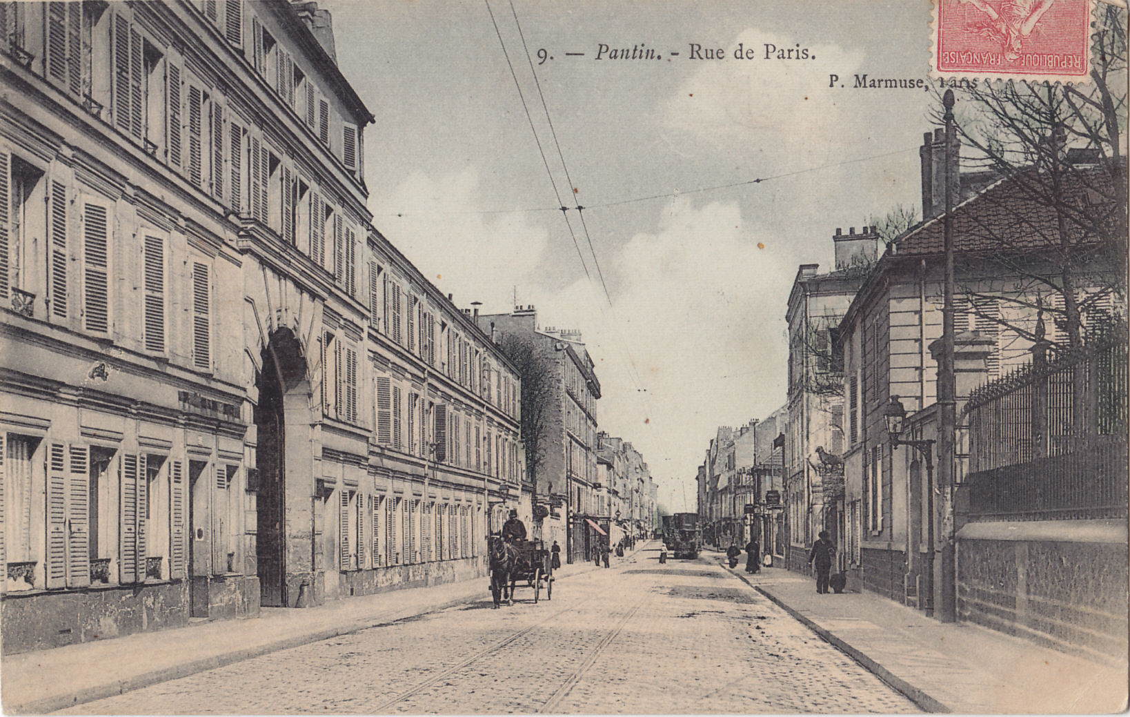 Carte postale ancienne éditée par Marmuse, n°9 :PANTIN - Rue de Paris